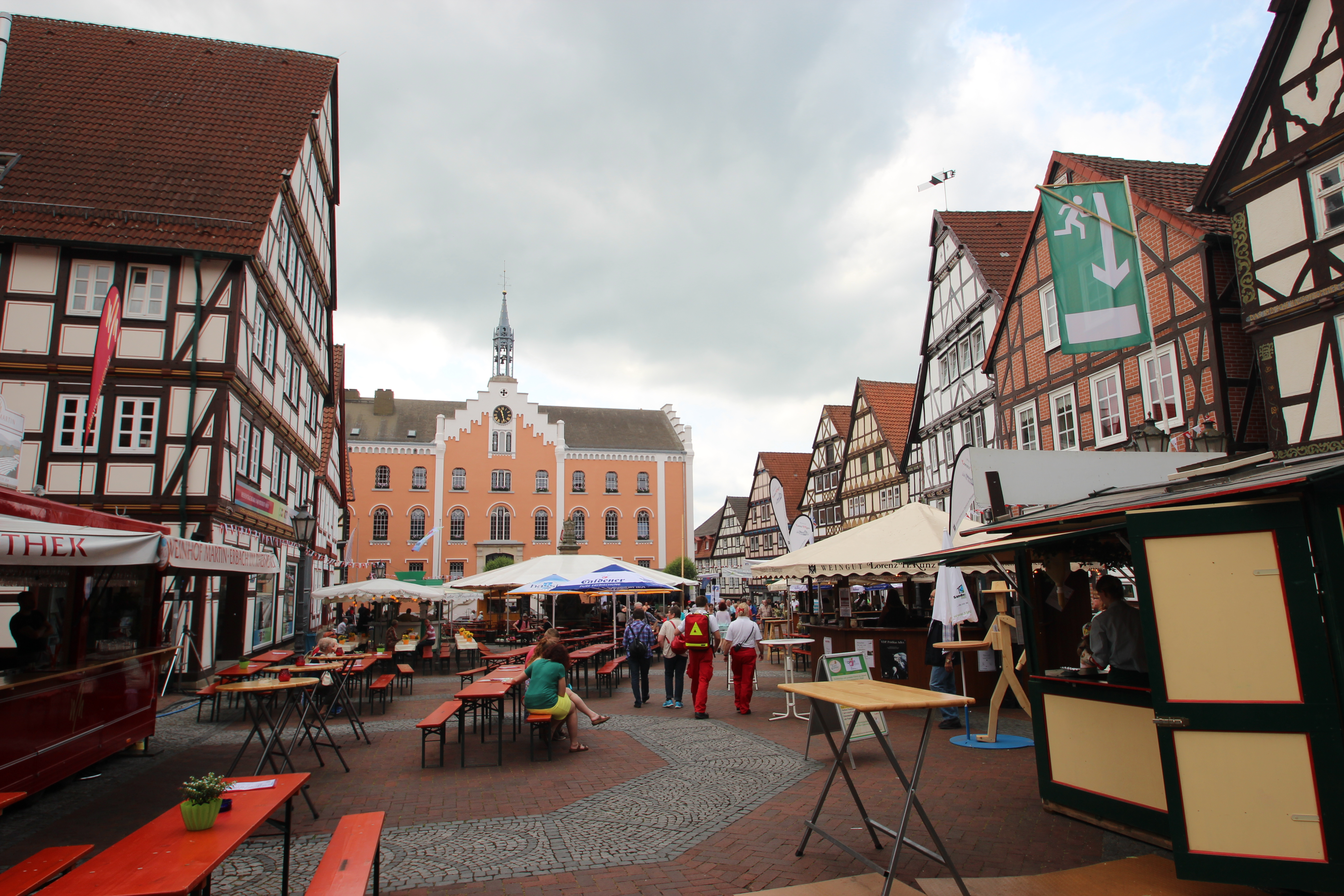 Hessentag 2015 - Marktplatz am 6. Juni vormittags